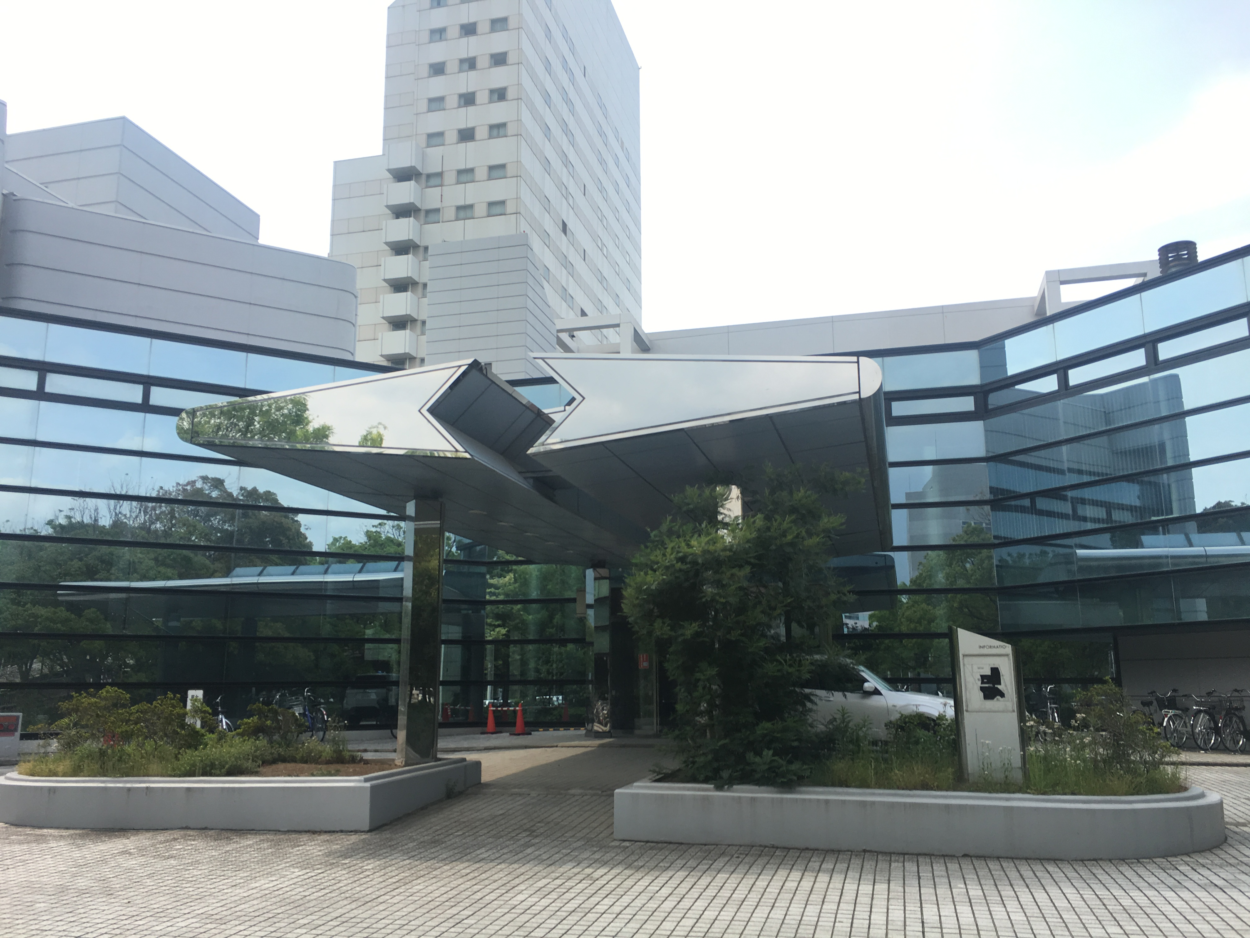 本人が撮影